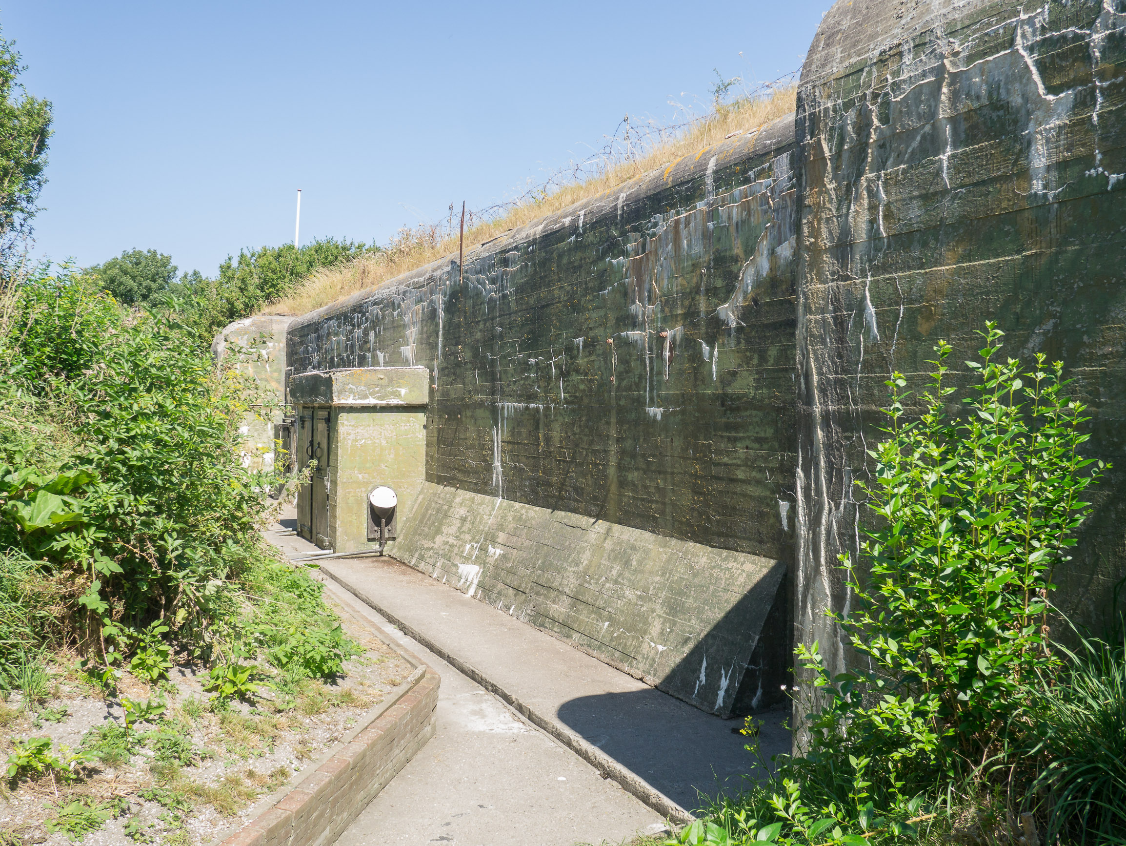 Kazemattenmuseum Kornwerderzand - Commando Kazemat